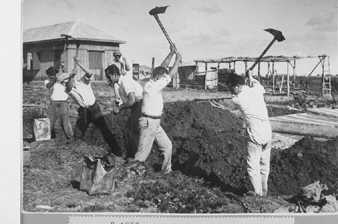 רעננה - העבודה בקיבוץ המכבי הצעיר